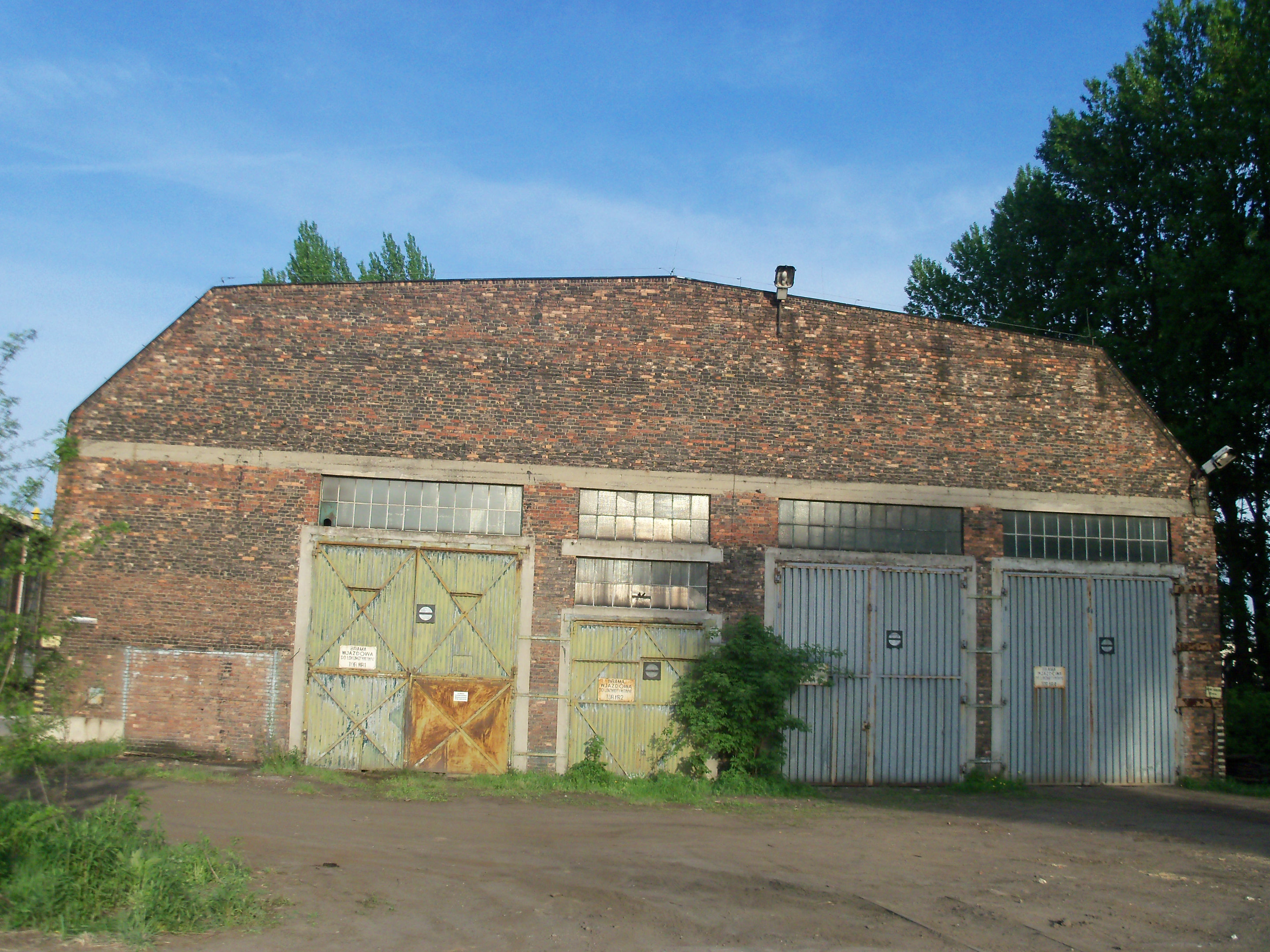 Huta Baildon w Katowicach